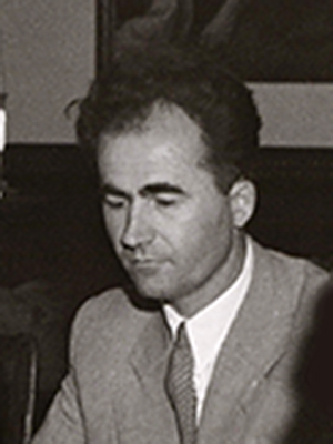 Srpski (latinica): Inventarski broj:1951_009_121